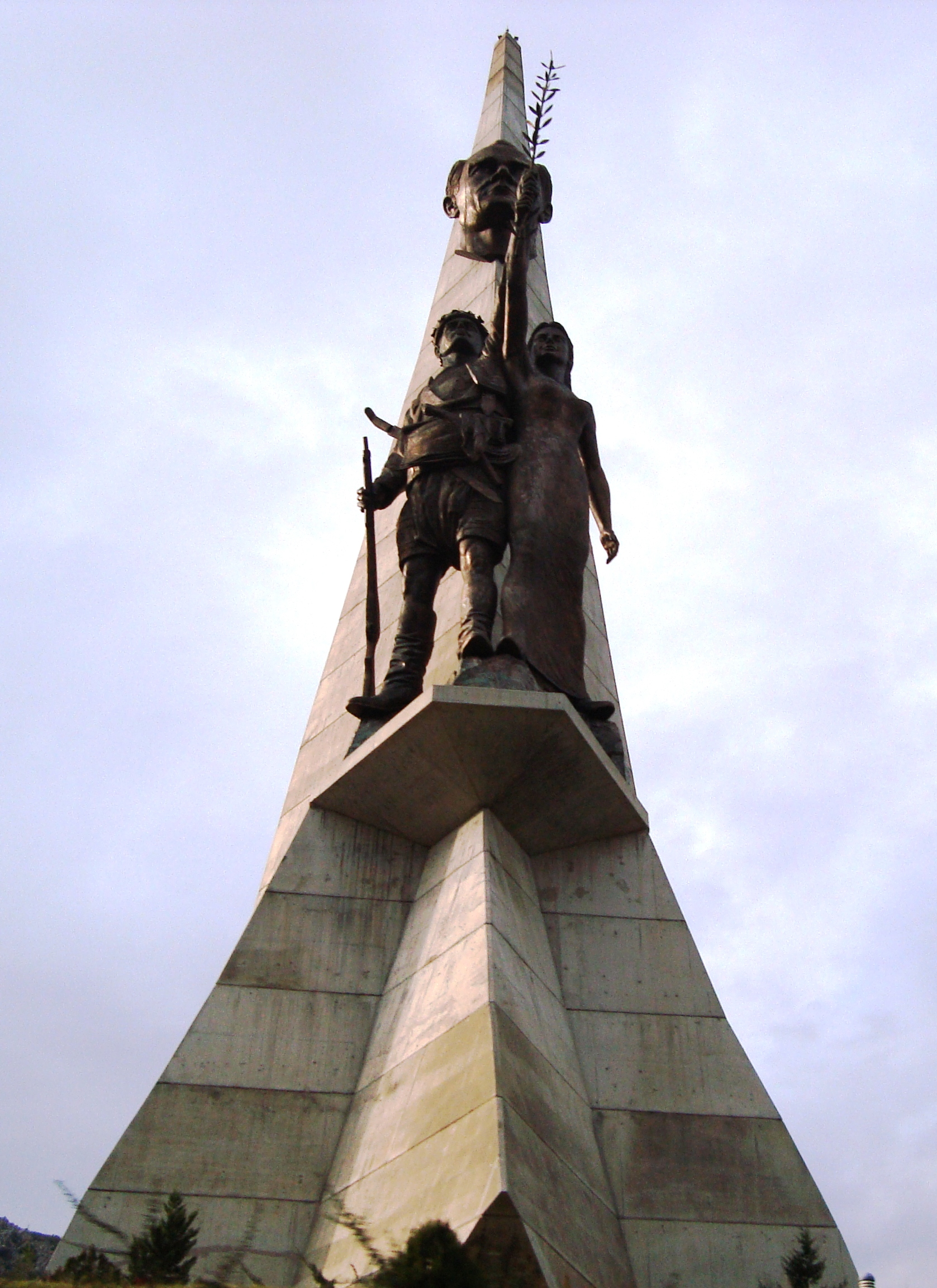 Manisa